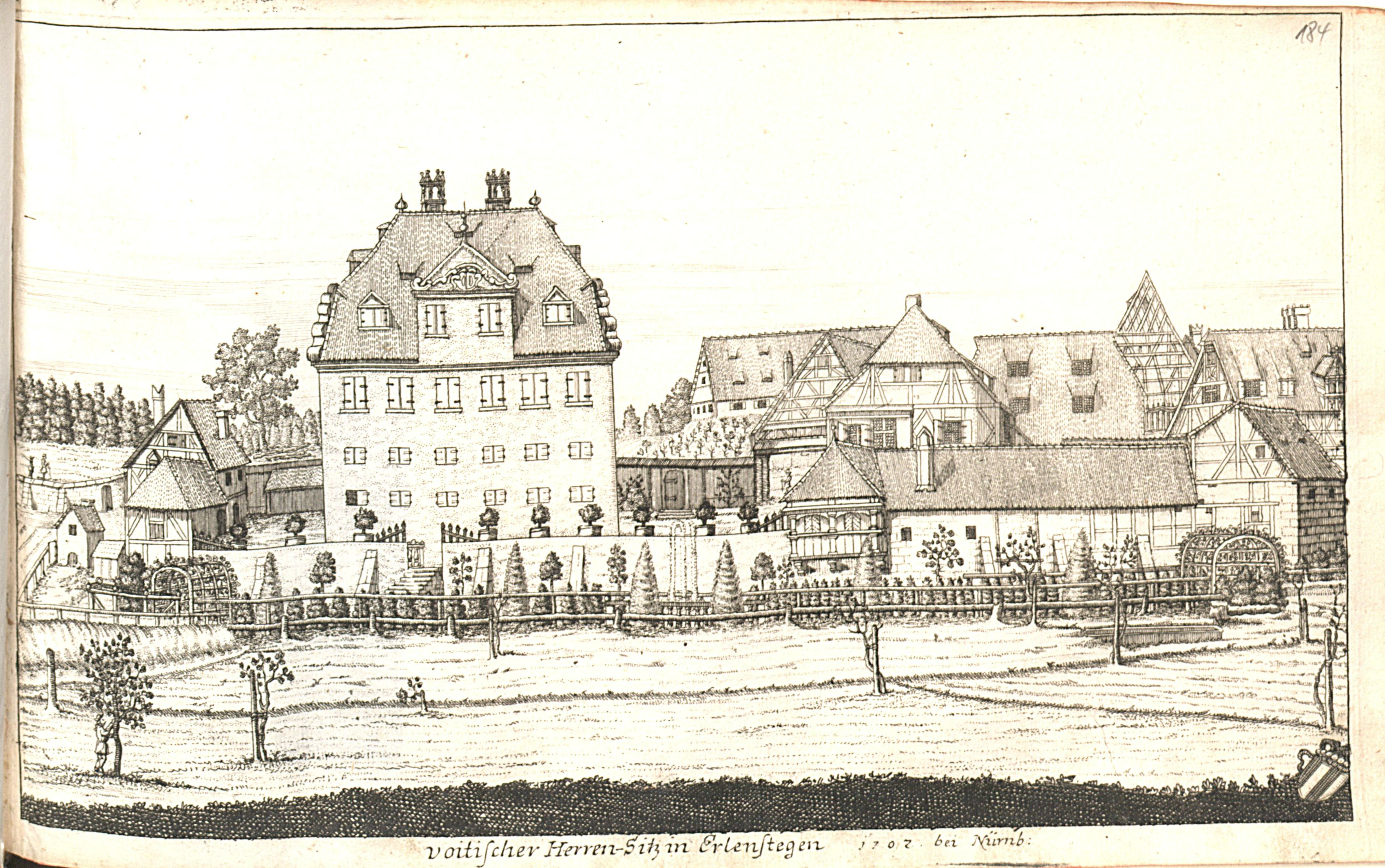 Stich aus "Des Heil. Röm. Reichs Stadt Nürnberg Zierdte" von Johann Alexander Böner. Exemplar mit der Signatur: Eichstätt-Ingolstadt, Universitätsbibliothek -- 04/1 WG 300